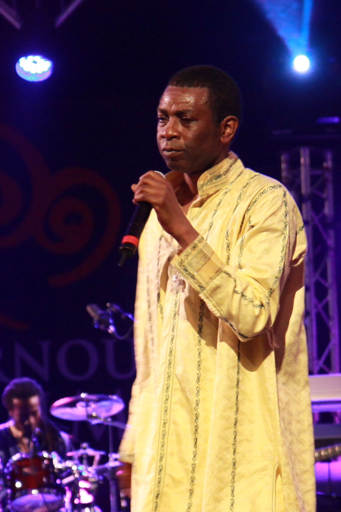 Youssou N'Dour en concert au festival de Cornouaille de Quimper le 25 juillet 2010 à l'espace Gradlon.